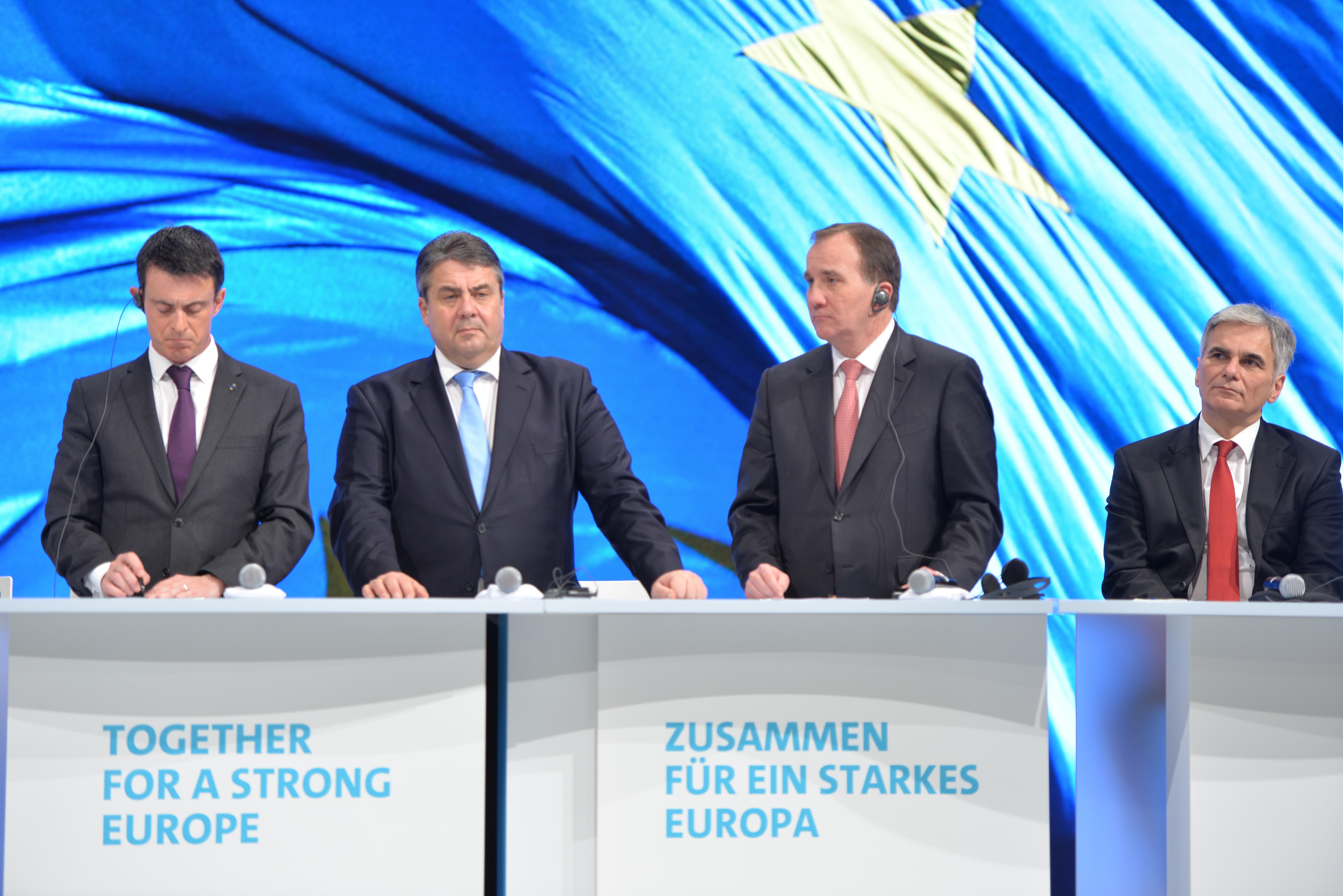 SPD Bundesparteitag 2015 - Gruppenaufnahmen